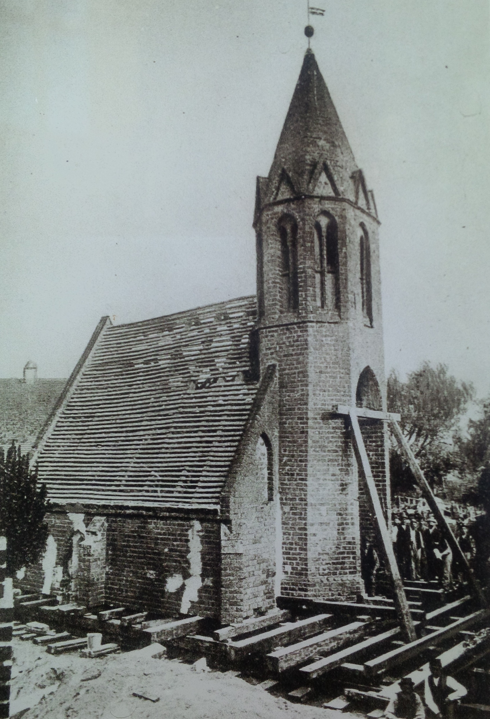 Foto von einer außen an der Kirche St. Jakob in Brandenburg befindlichen Informationstafel: Darauf dargestellt ein Foto der Verrückung der Kirche